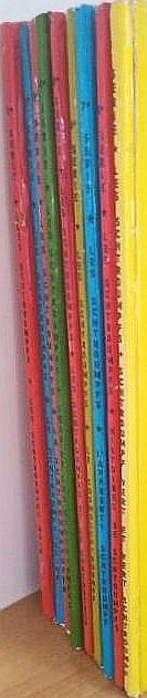 Neuf premiers tomes des schtroumpfs, avec dos ronds.